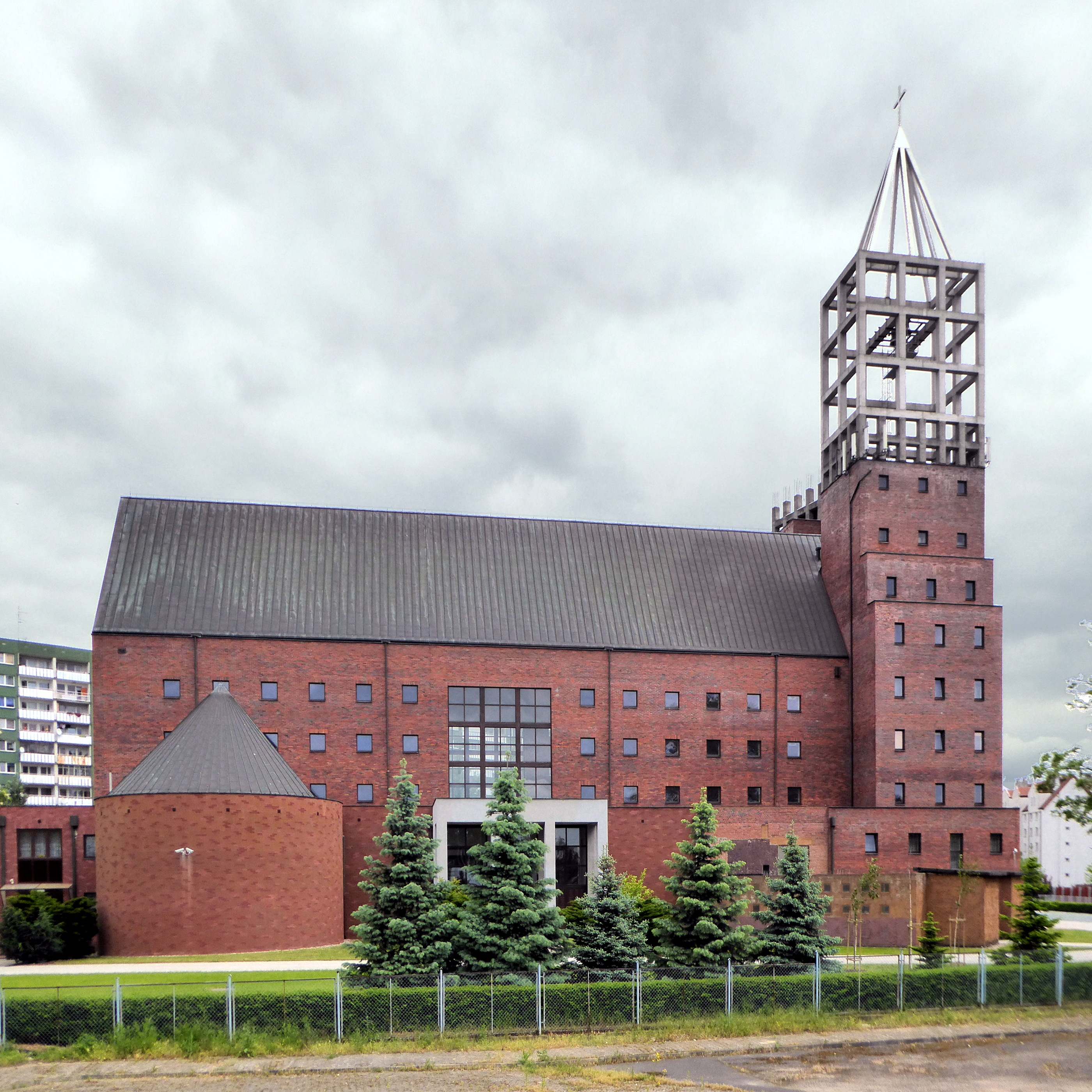 Breslau, Welterlöserkirche in Rosenthal, von Westen gesehen.